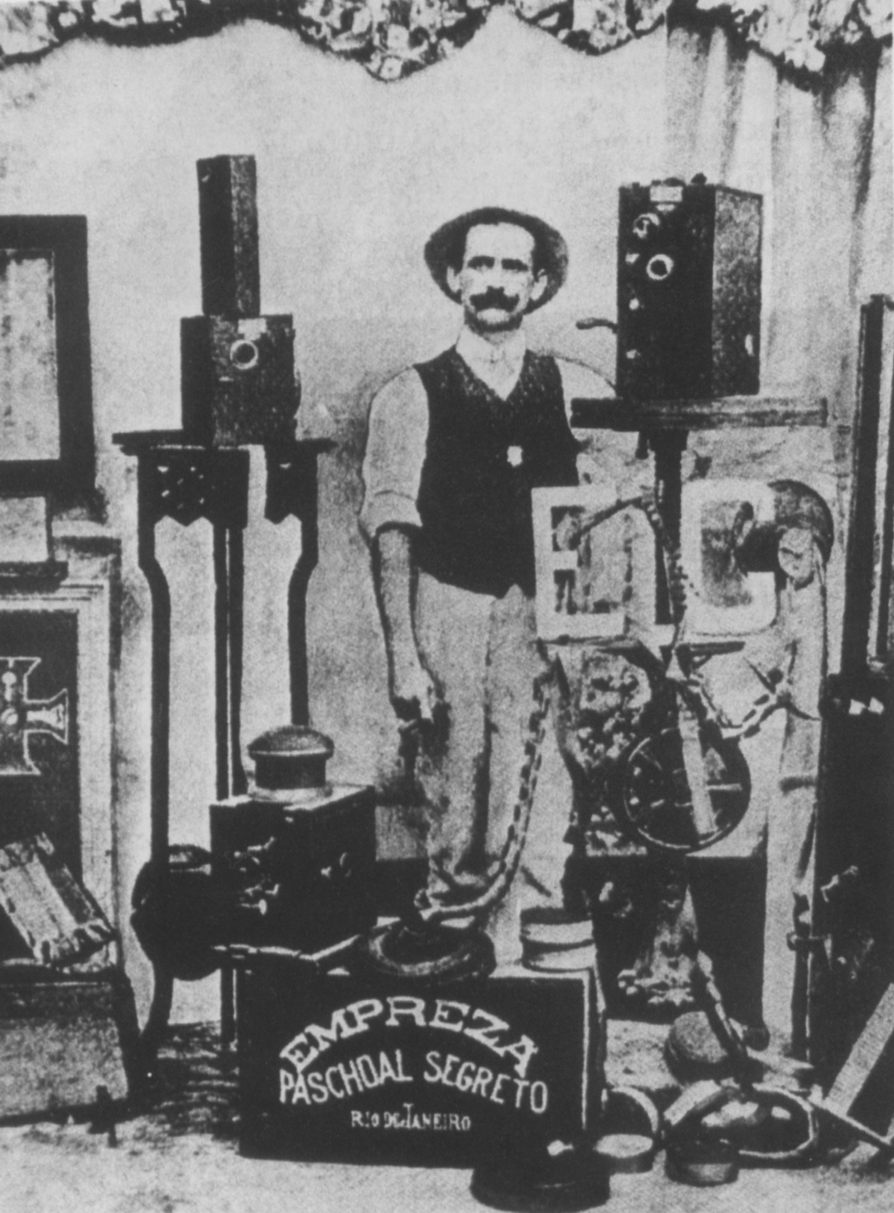 Afonso Segreto, irmão do pioneiro do cinema no Brasil, Paschoal Segreto (1868-1920).